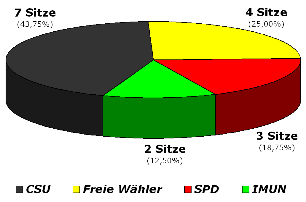 Grafik zur Sitzverteilung im Gemeinderat Niedernberg nach Wahl im Jahr 2014